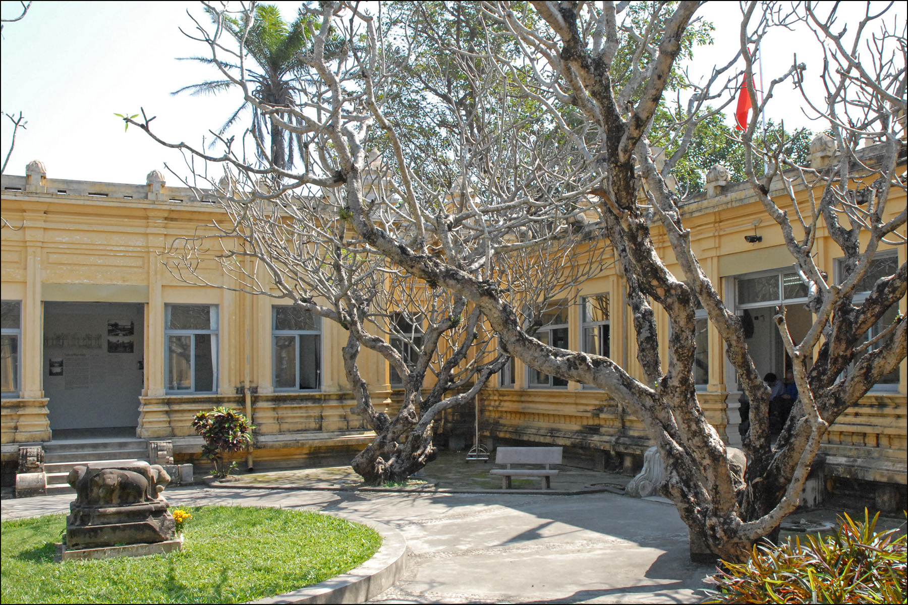 La cour du musée Construit par l’École Française d’Extrême-Orient en 1915, le musée fut initialement baptisé Musée Henri Parmentier (nom de l’un des premiers explorateurs des sites du Royaume du Champa). Les oeuvres sont classées par provenance et par période, ce qui permet de suivre, de salle en salle, l’évolution de l’art cham au niveau de la sculpture. La majorité des objets proviennent des sites de Tra Kieu (ancienne capitale administrative du Royaume du Champa), de My Son, de Dong Duong (centre bouddhiste) et de Thap Man.